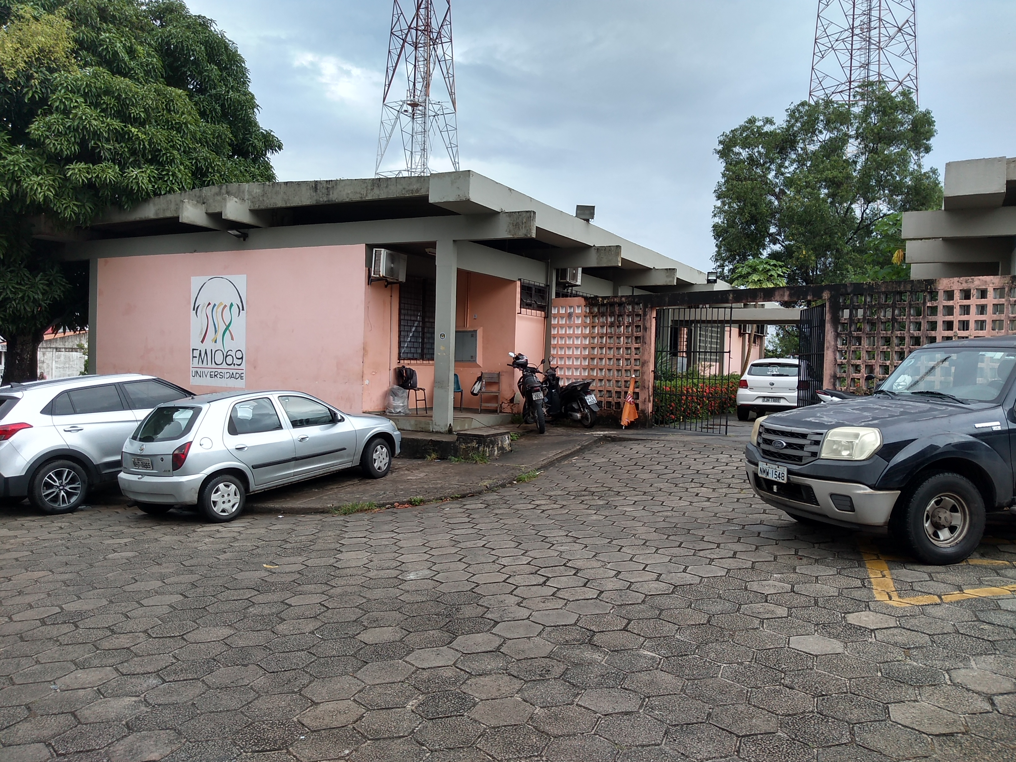 Sede da Universidade FM, emissora de rádio sediada em São Luís, MA - Brasil